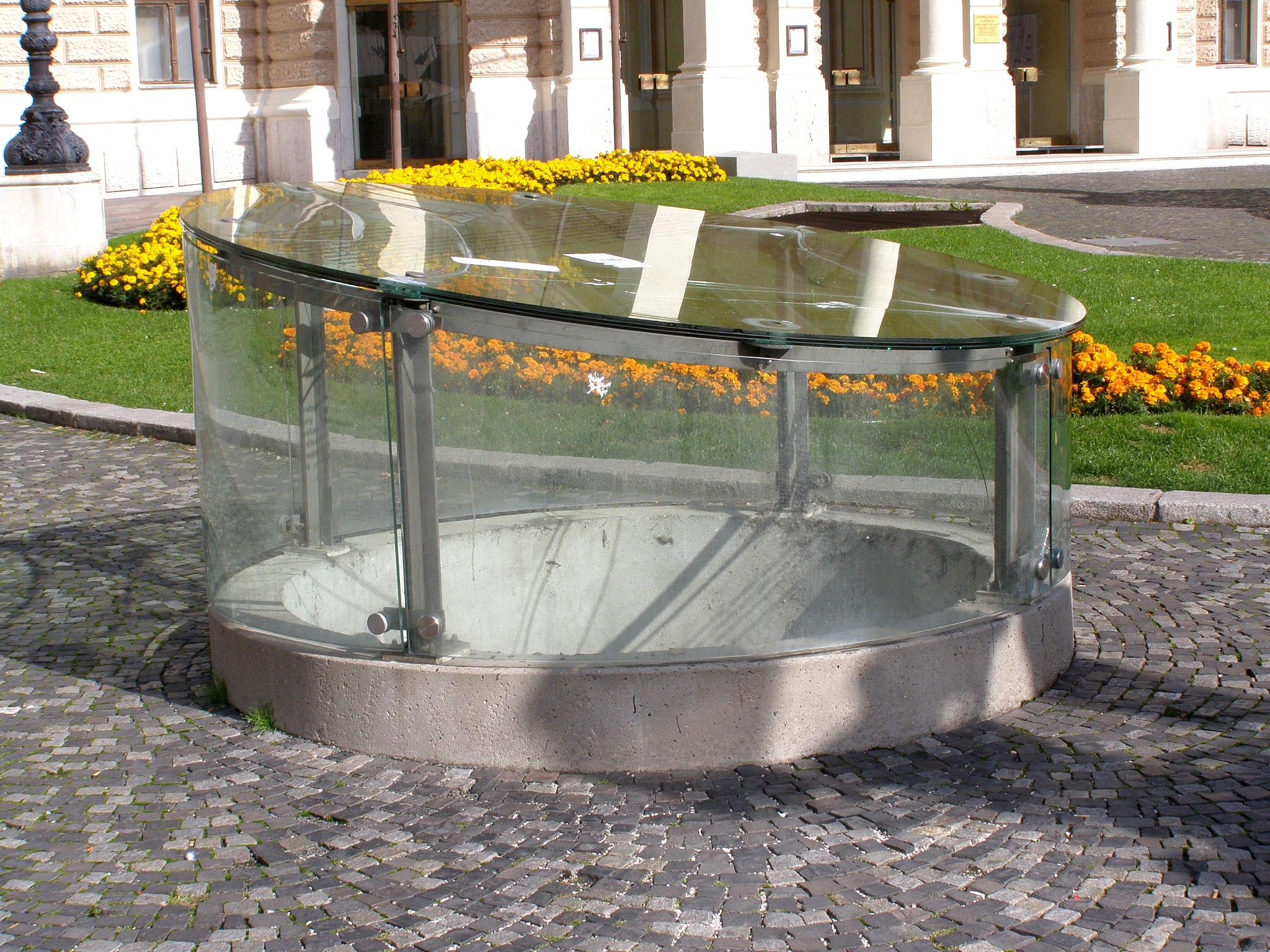 Priehľad do podzemia so zakonzervovanými nálezmi muriva predbránia Rybárskej brány